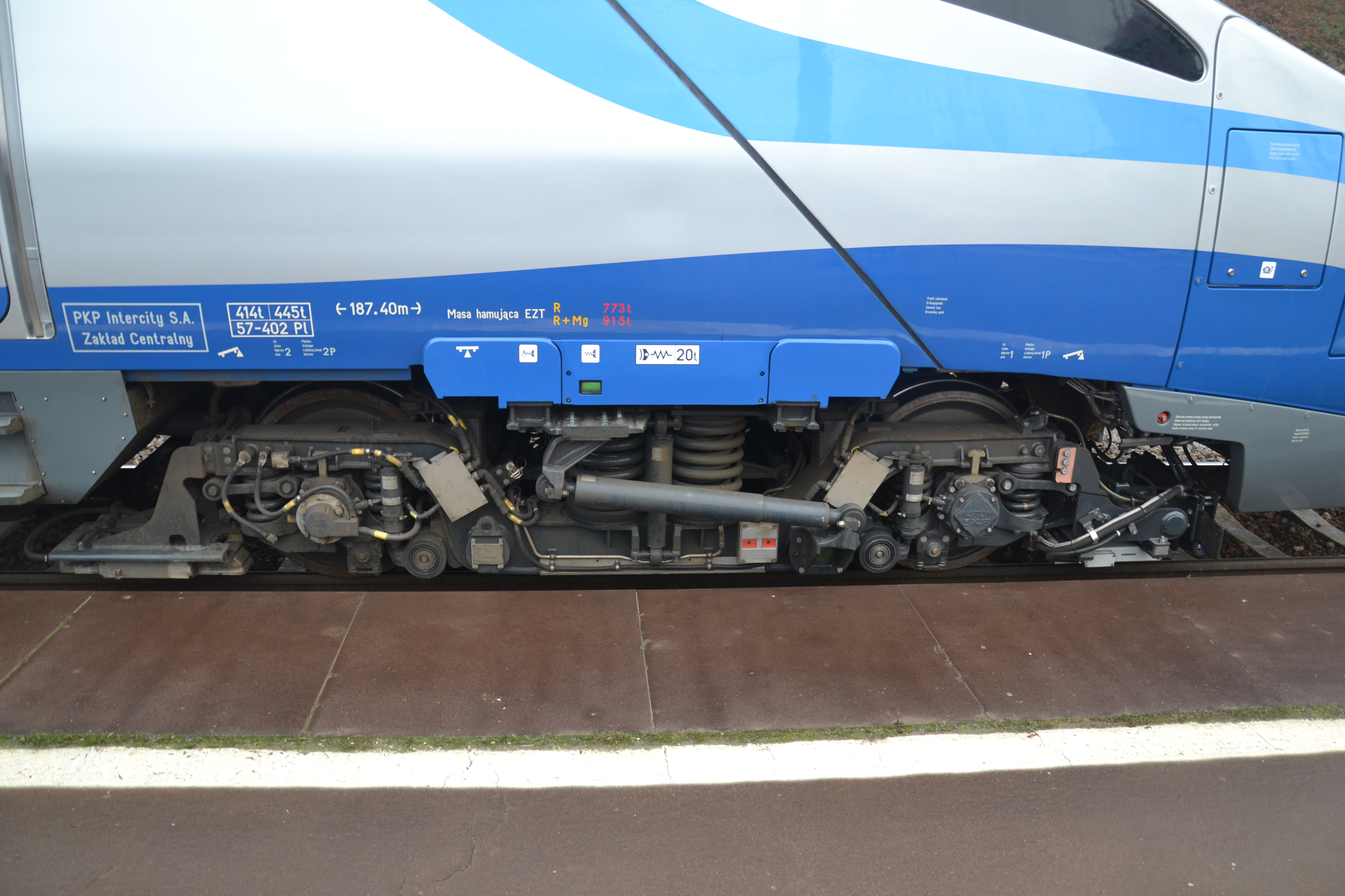 Wózek ED250-007, zbliżenie